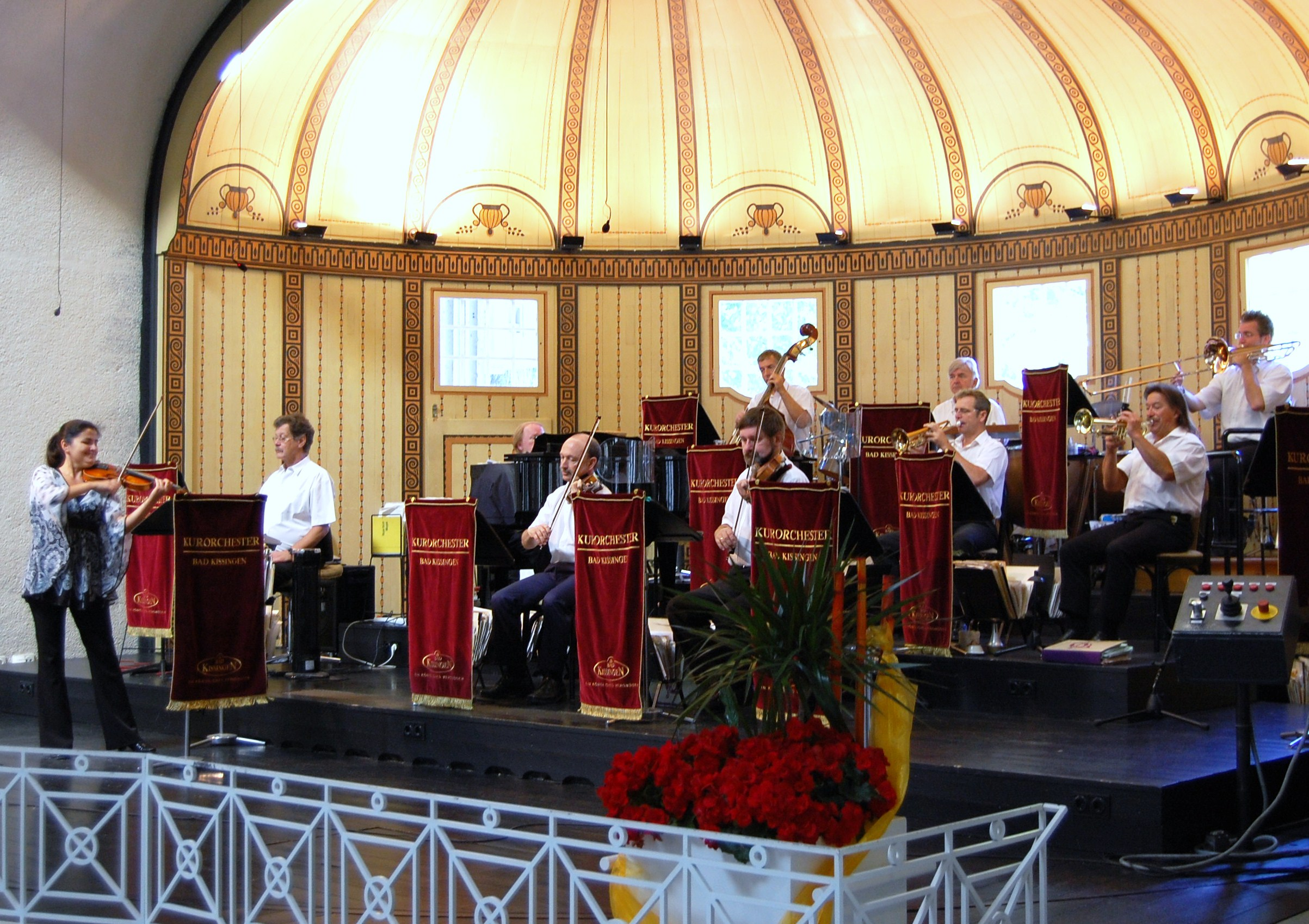 Bad Kissinger Kurorchester unter Leitung der bulgarischen Violinistin Elena Iossifova (links)